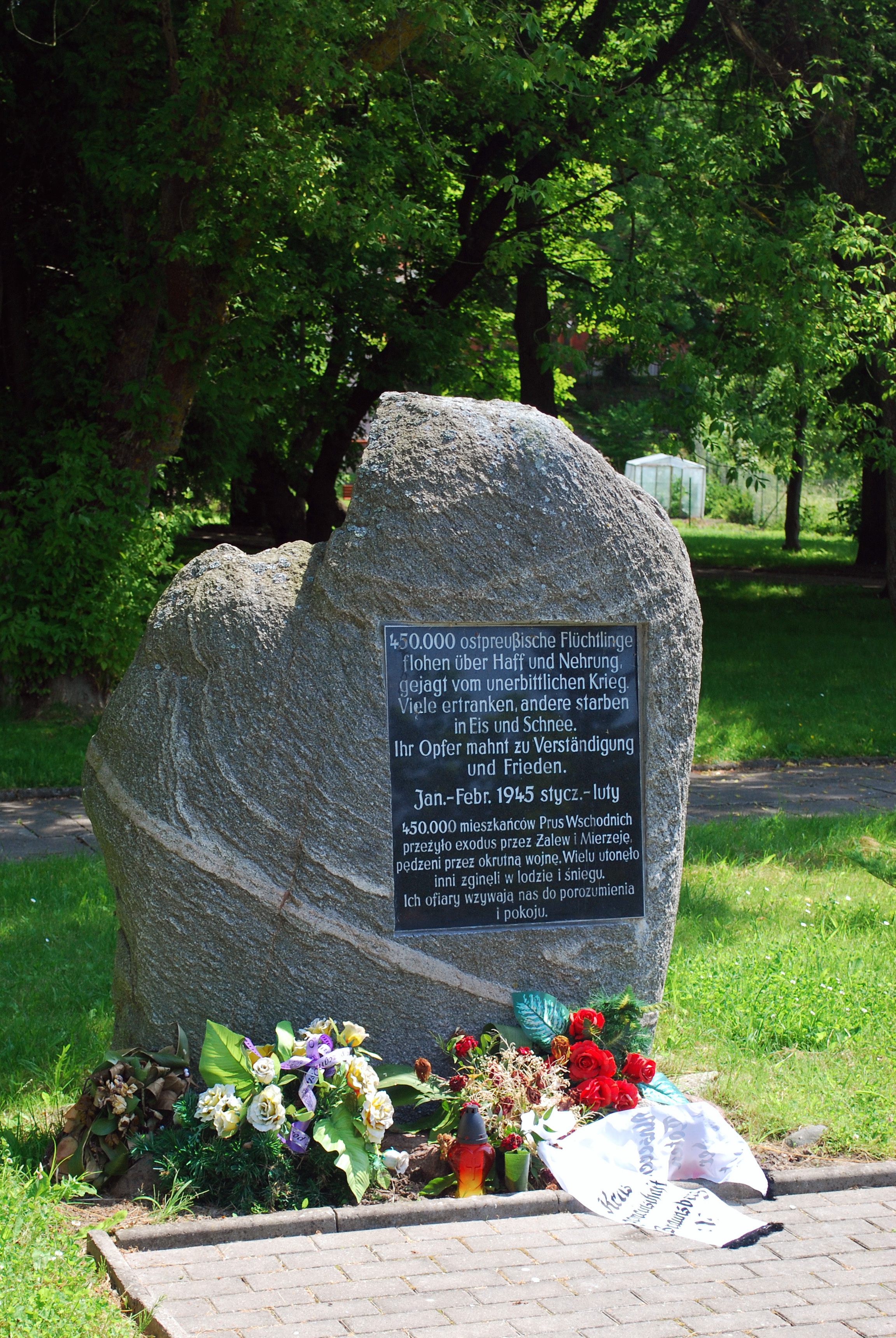 Kamień z tablicą ziomkostwa niemieckiego we Fromborku.